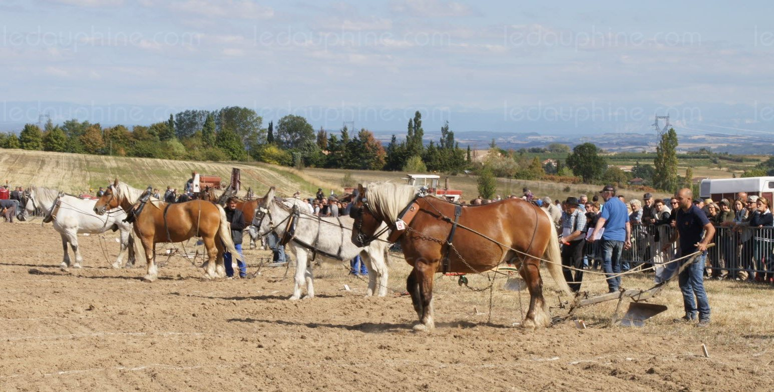 Peaugres détail